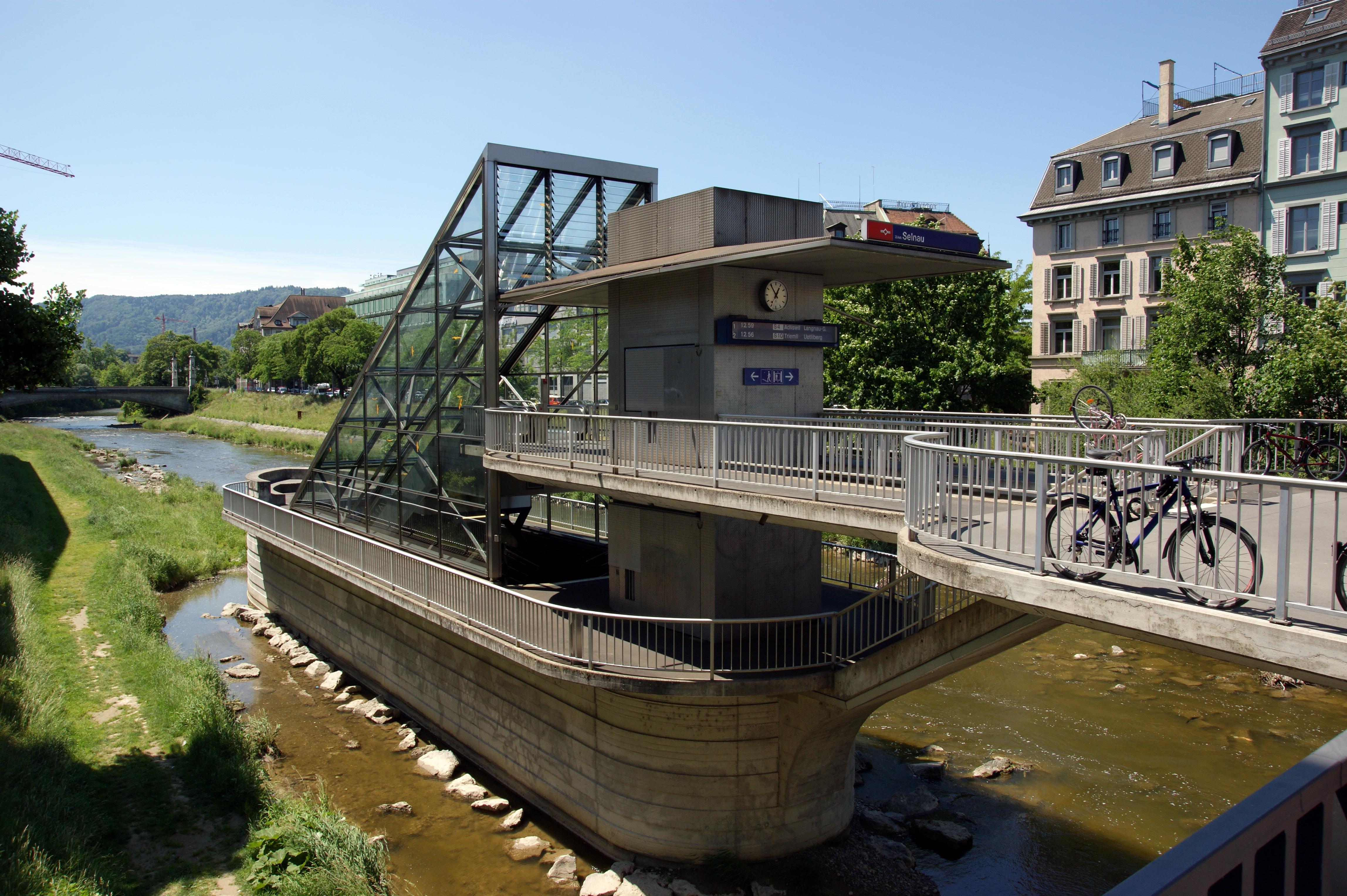 Výtah na nádraží Selnau v Curychu, Švýcarsko